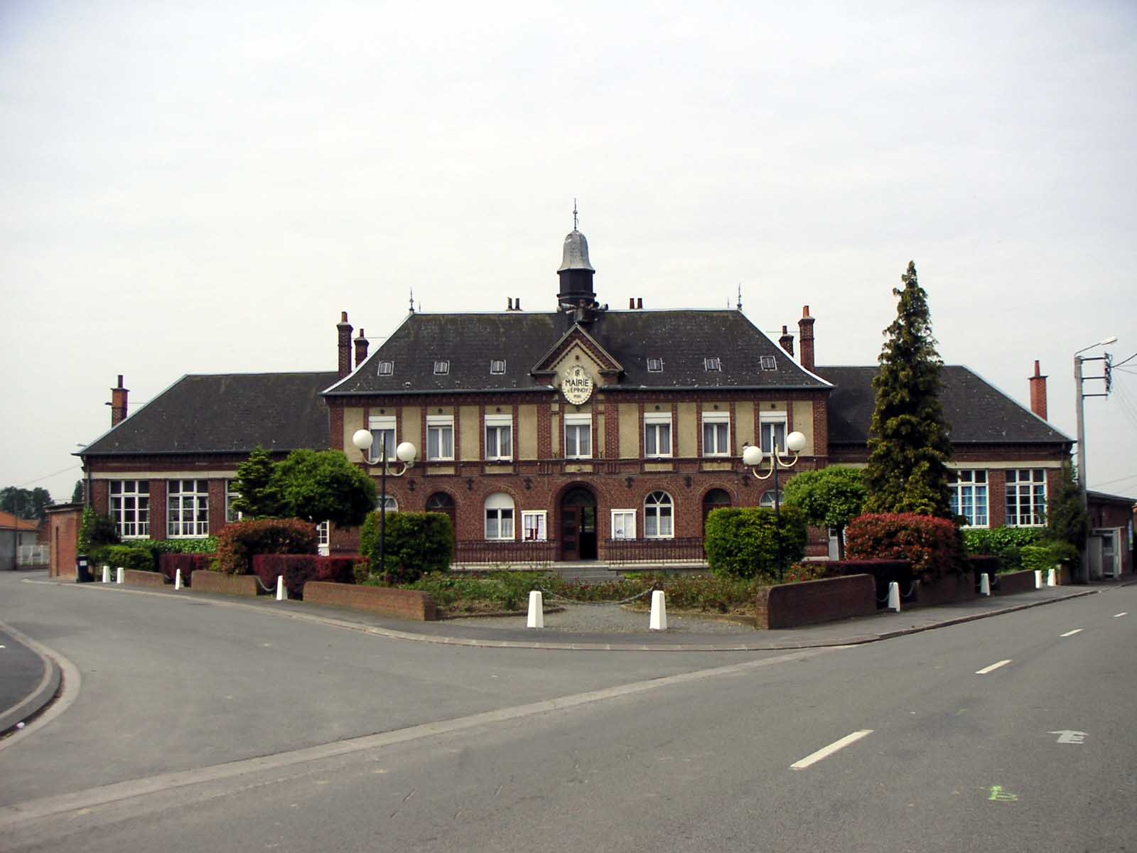 Vue de la mairie d'Epinoy (Pas-de-Calais) Image prise par Padawane le 19 mai 2005 Padawane